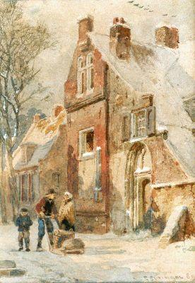 Mariaklooster in Hasselt Overijssel